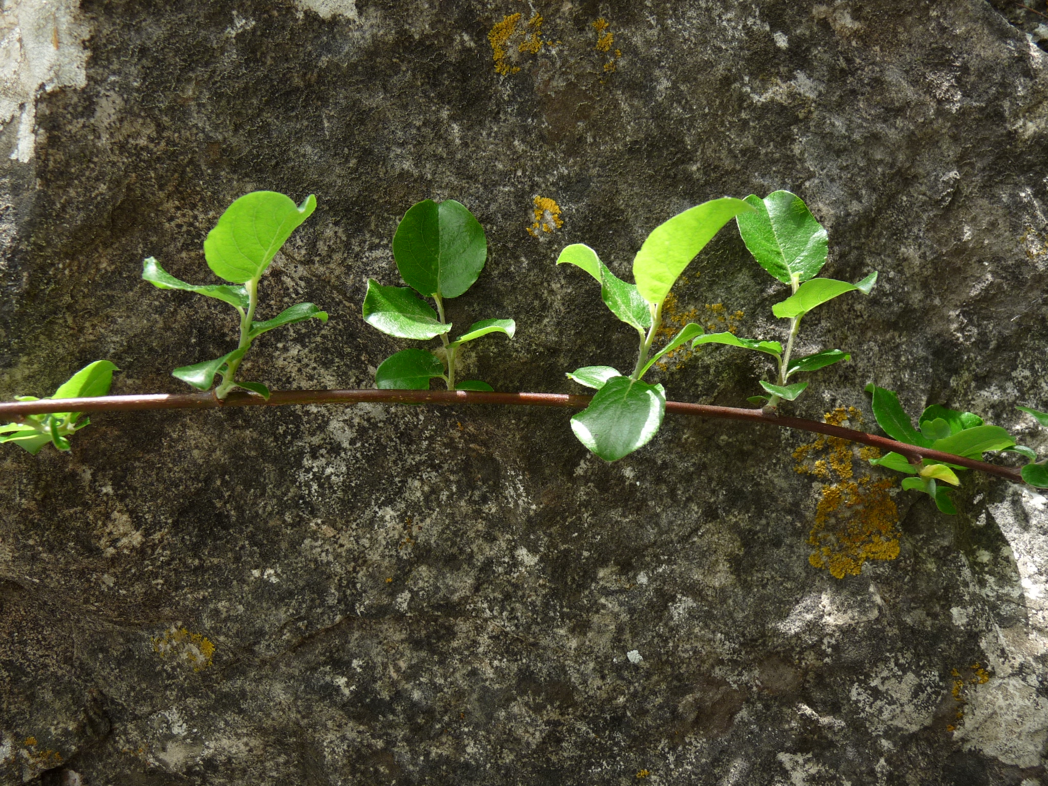 Tija de Salix tarraconensis, exemplar de la Serra de Prades